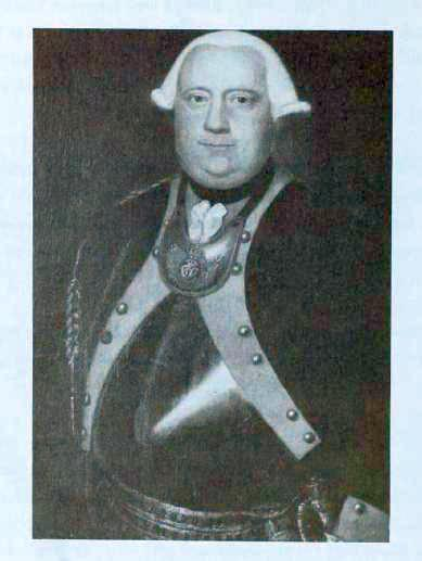 Porträt des Oberst Voit von Salzburg, Führer der 1777 von Markgraf Alexander von Ansbach gegen die Amerikaner an England in Sold gegebene zwei Infanterie-Regimenter und Jäger, Original im Bayrischen Armeemuseum in Ingolstadt